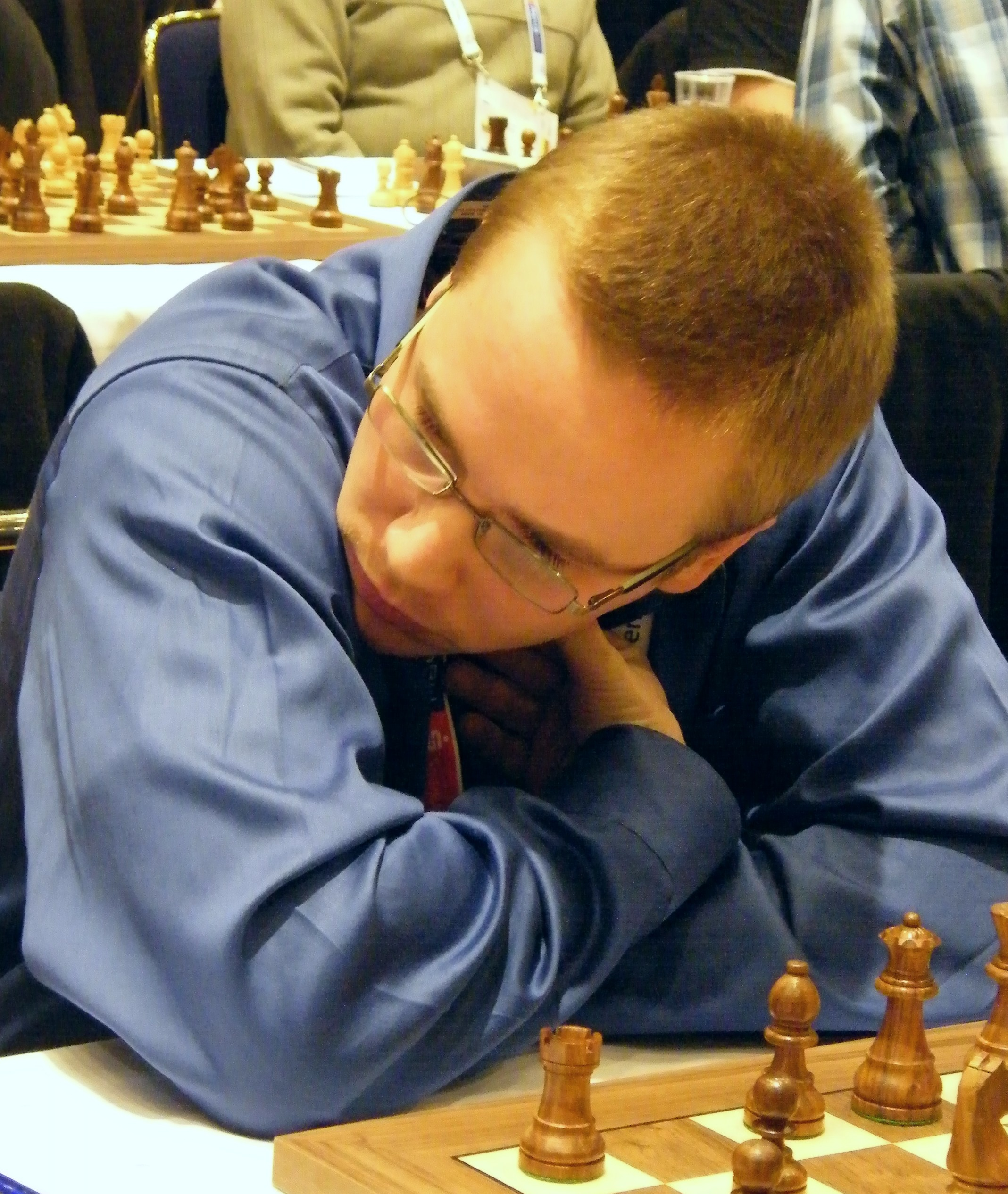 Peter Vavrak bei der 38. Schacholympiade in Dresden 2008